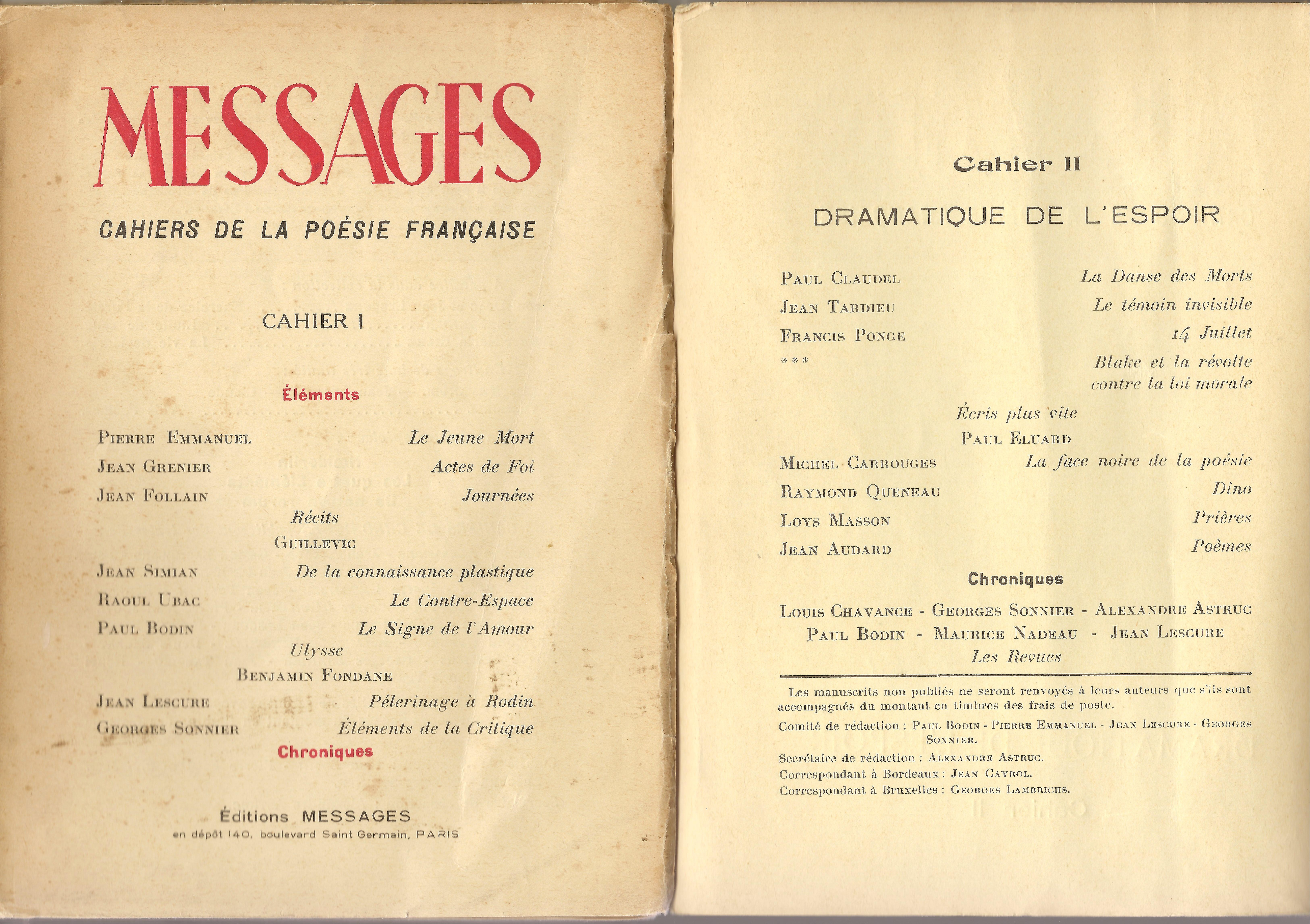 Couverture de la revue Messages 1942, I, et sommaire de la revue Messages 1942, II, dirigée par Jean Lescure